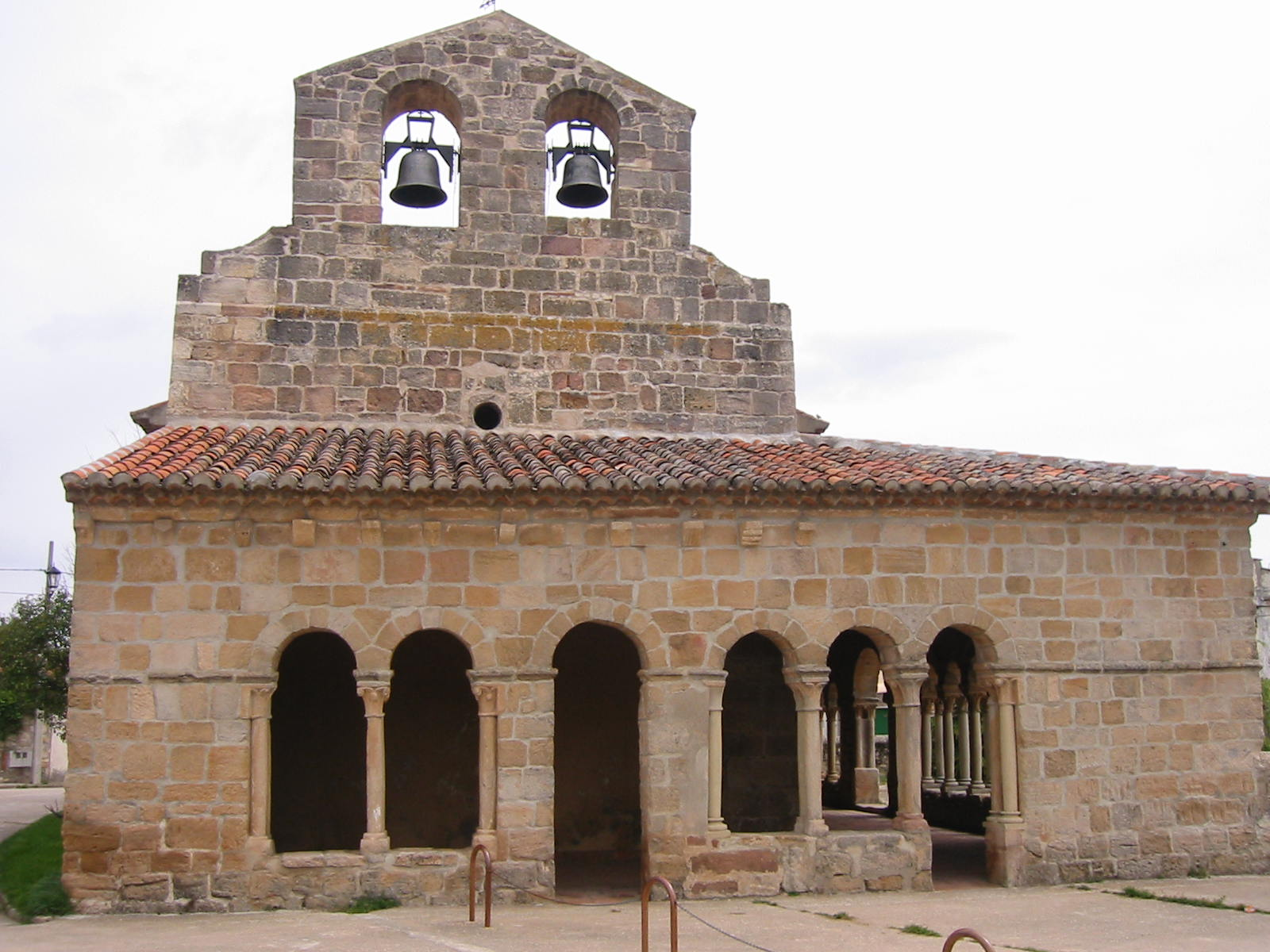 Iglesia Saúca (Guadalajara).